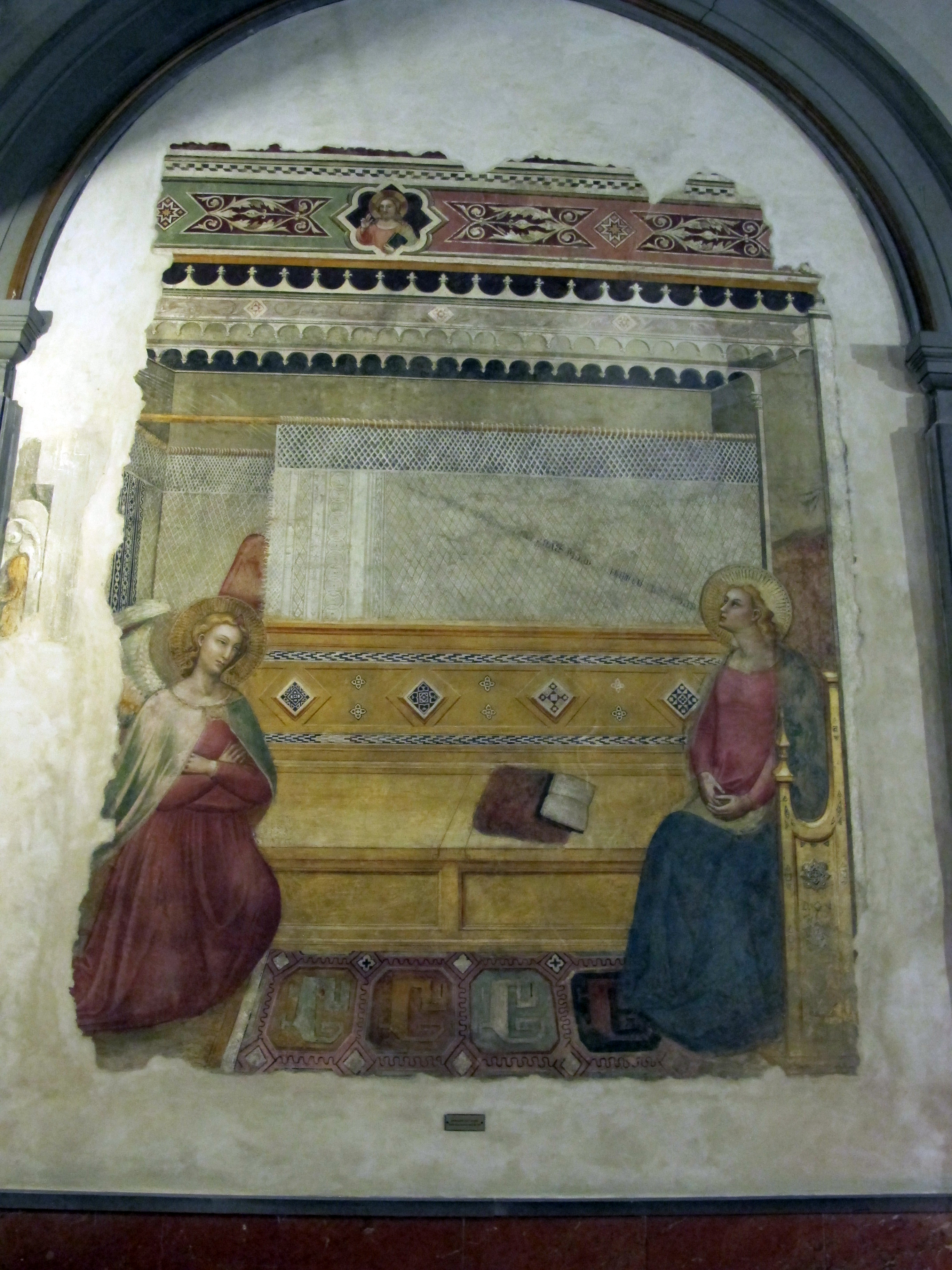 Santa Lucia sul Prato, Firenze - Interno